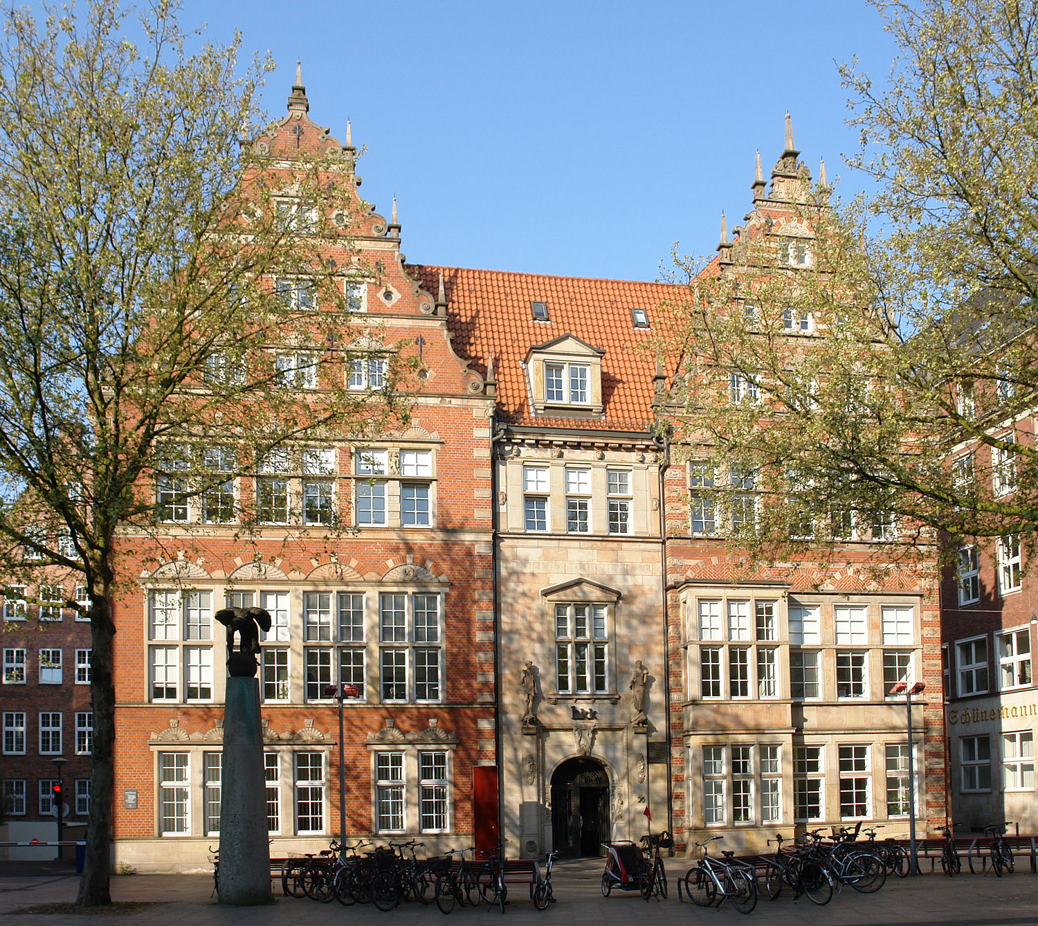 Haus der Handelskrankenkasse in der Martinistraße 24, Bremen. 1912–1915 erbaut durch die Deutsche Dampfschifffahrtsgesellschaft „Hansa“ unter Einbeziehung von Teilen zweier Hausgiebel aus den Jahren 1570 und 1630 durch Heinrich Behrens und Friedrich Neumark. 1944 weitgehend zerstört. Nach 1945 wiederaufgebaut. 1981 Erwerb des Gebäudes durch die Handelskrankenkasse. Das abgebildete Objekt ist ein geschütztes Kulturdenkmal in der Freien Hansestadt Bremen, mit der Nr. 1103 beim Landesamt für Denkmalpflege registriert.